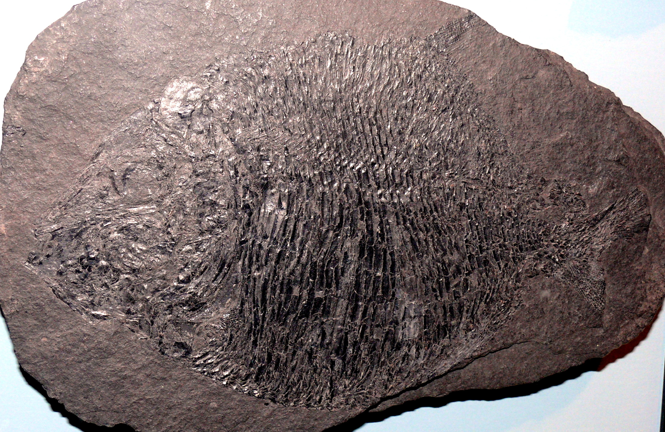 Platysomus gibbosus, Karbon bis Perm. Mansfeld, Sachsen-Anhalt.